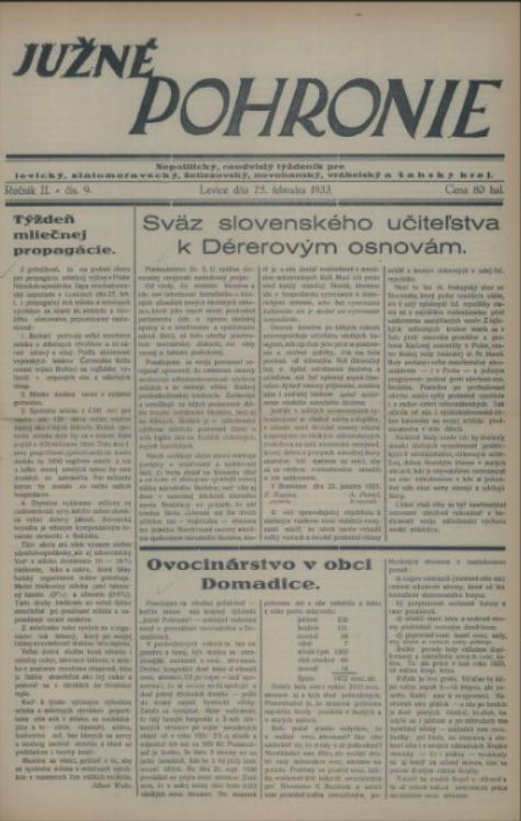 Titulný list týždenníka Južné Pohronie.